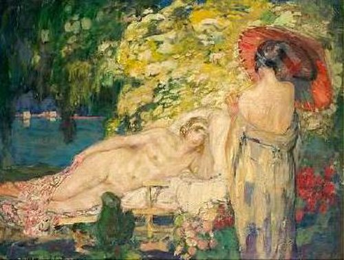 Conversation dans un jardin